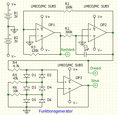 Funktionsgenerator mit OPAMP